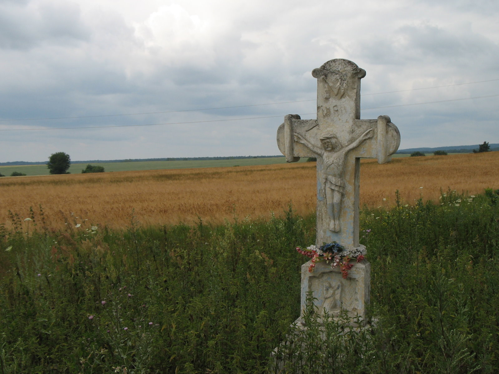 Radruż (Poland)